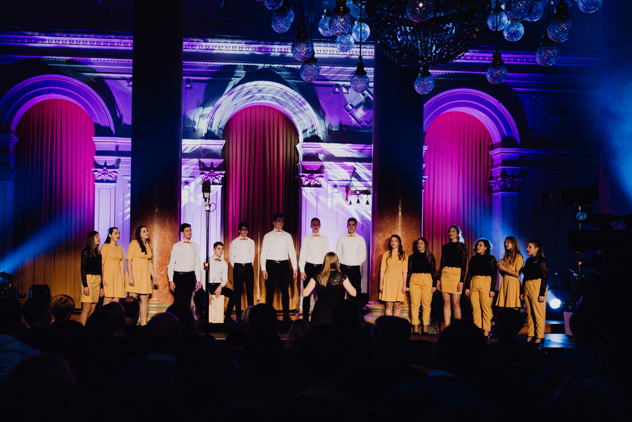 Koncert Skupine Sled januarja 2020 v Kristalni dvorani Grand Hotela Rogaška